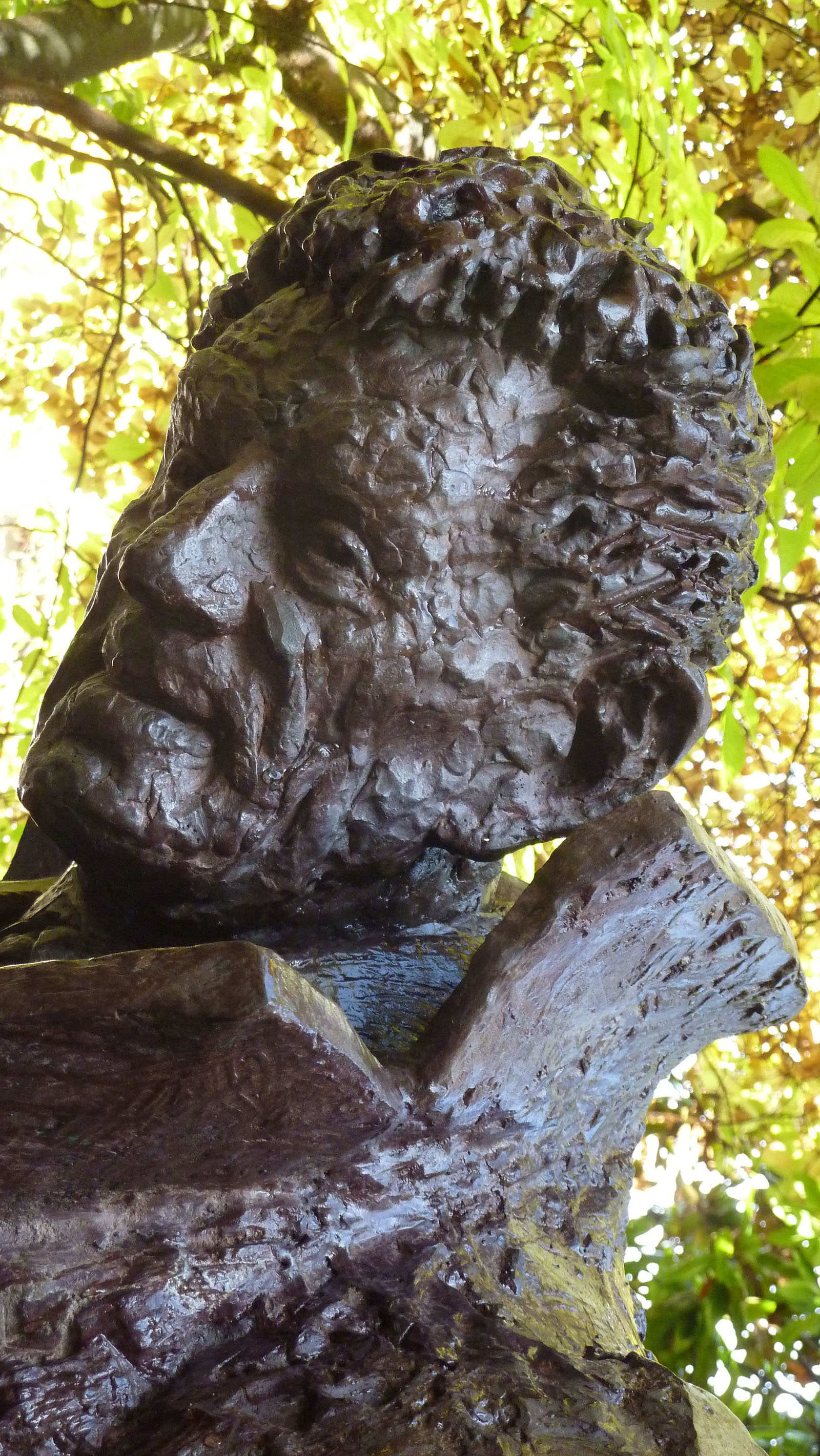 Periodista